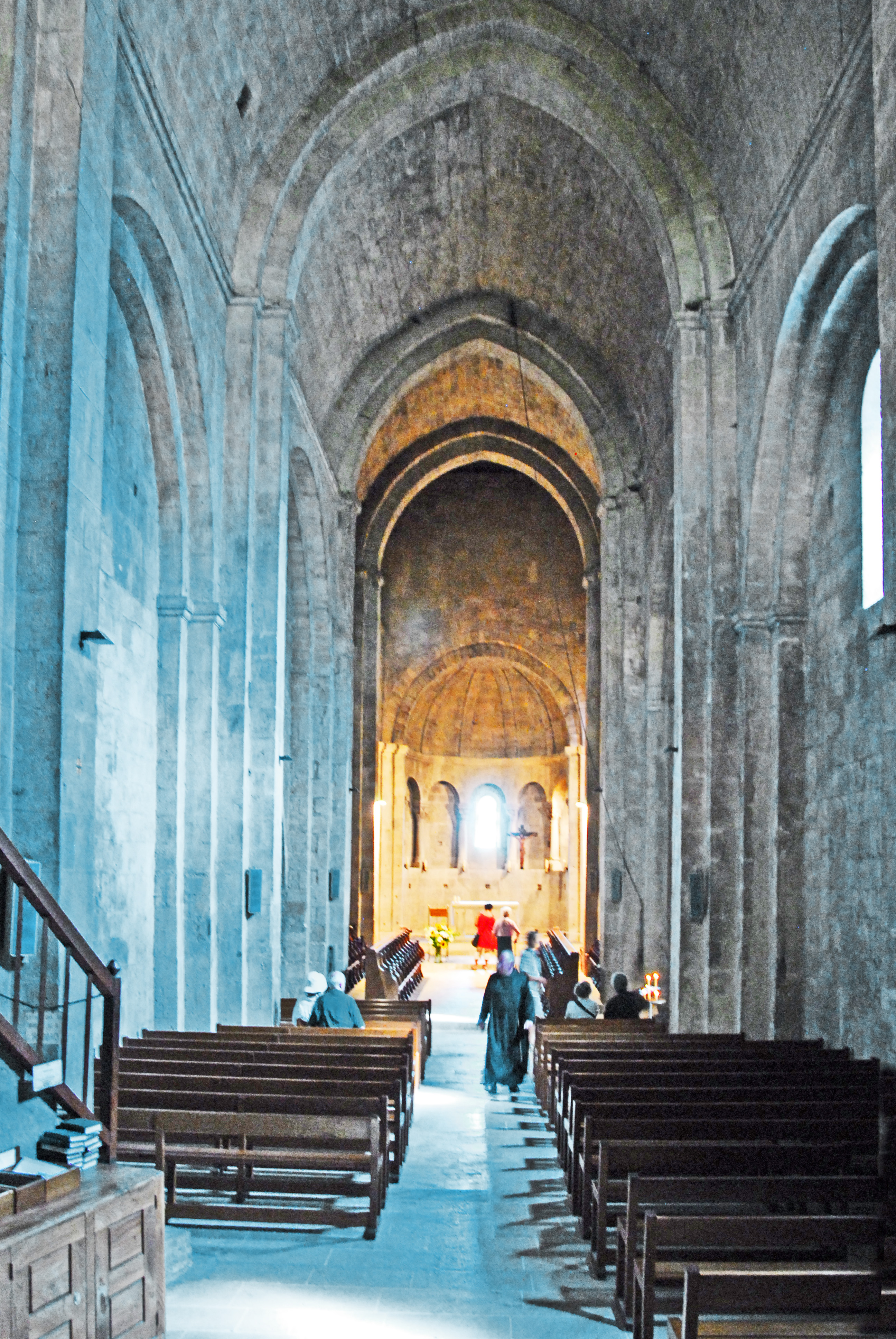 Prieuré de Ganagobie, Schiff vom Eingang